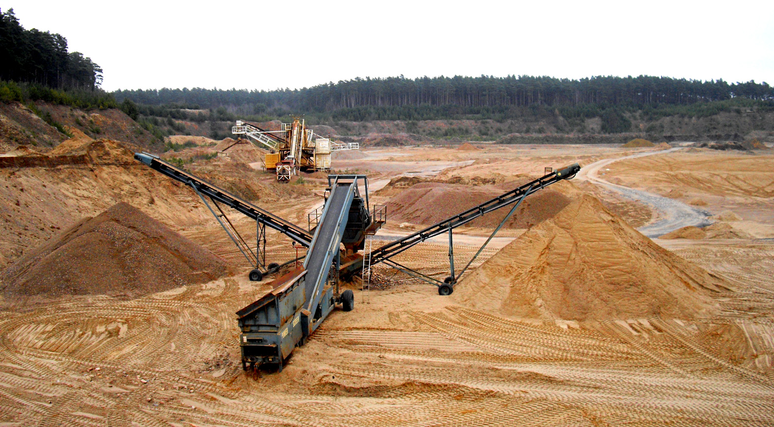 Kiesgrube Bernau 2012